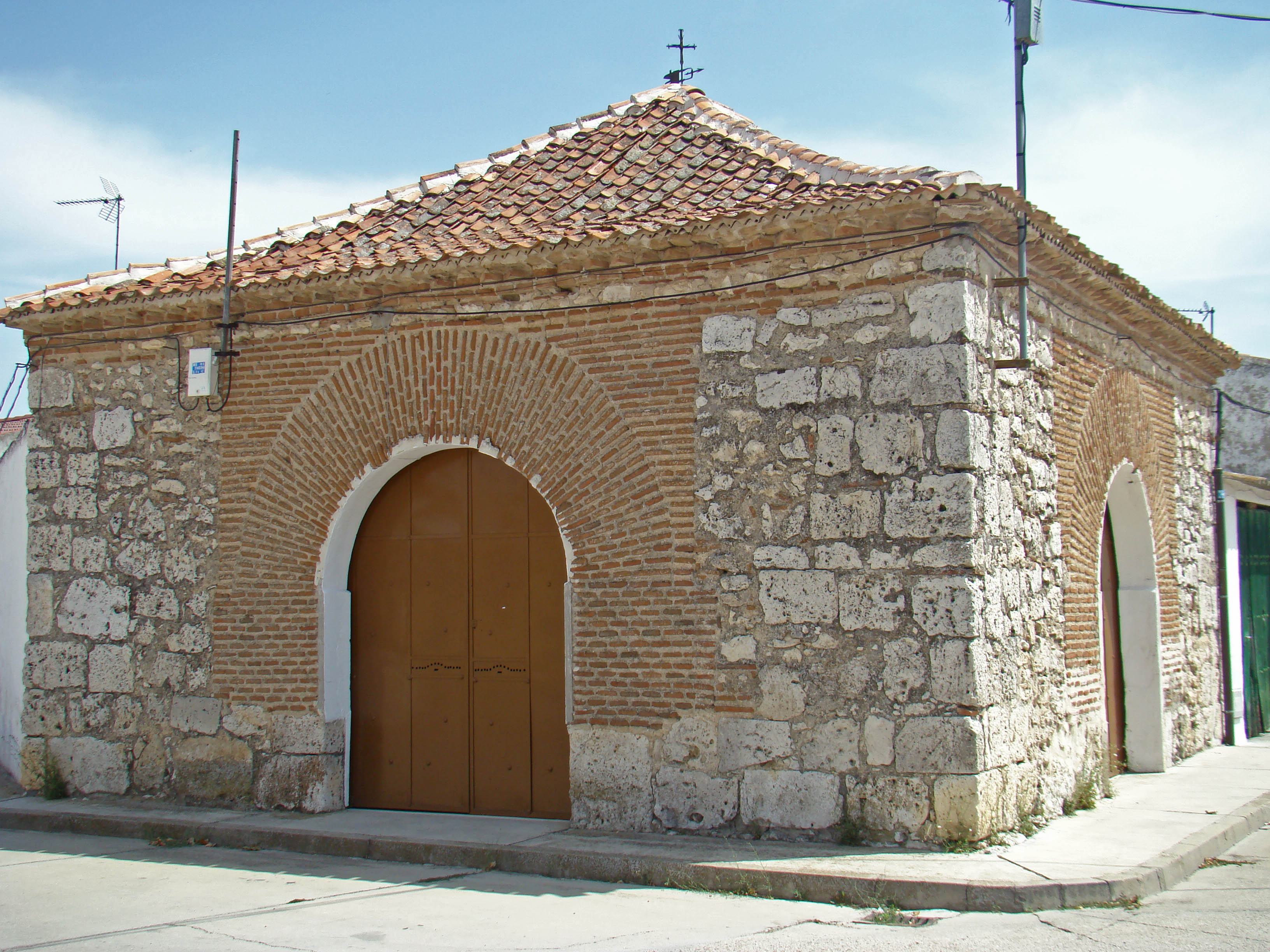 La Pedraja de Portillo, municipio de Valladolid (España). Ermita o humilladero del Cristo construida en mampostería y ladrillos.